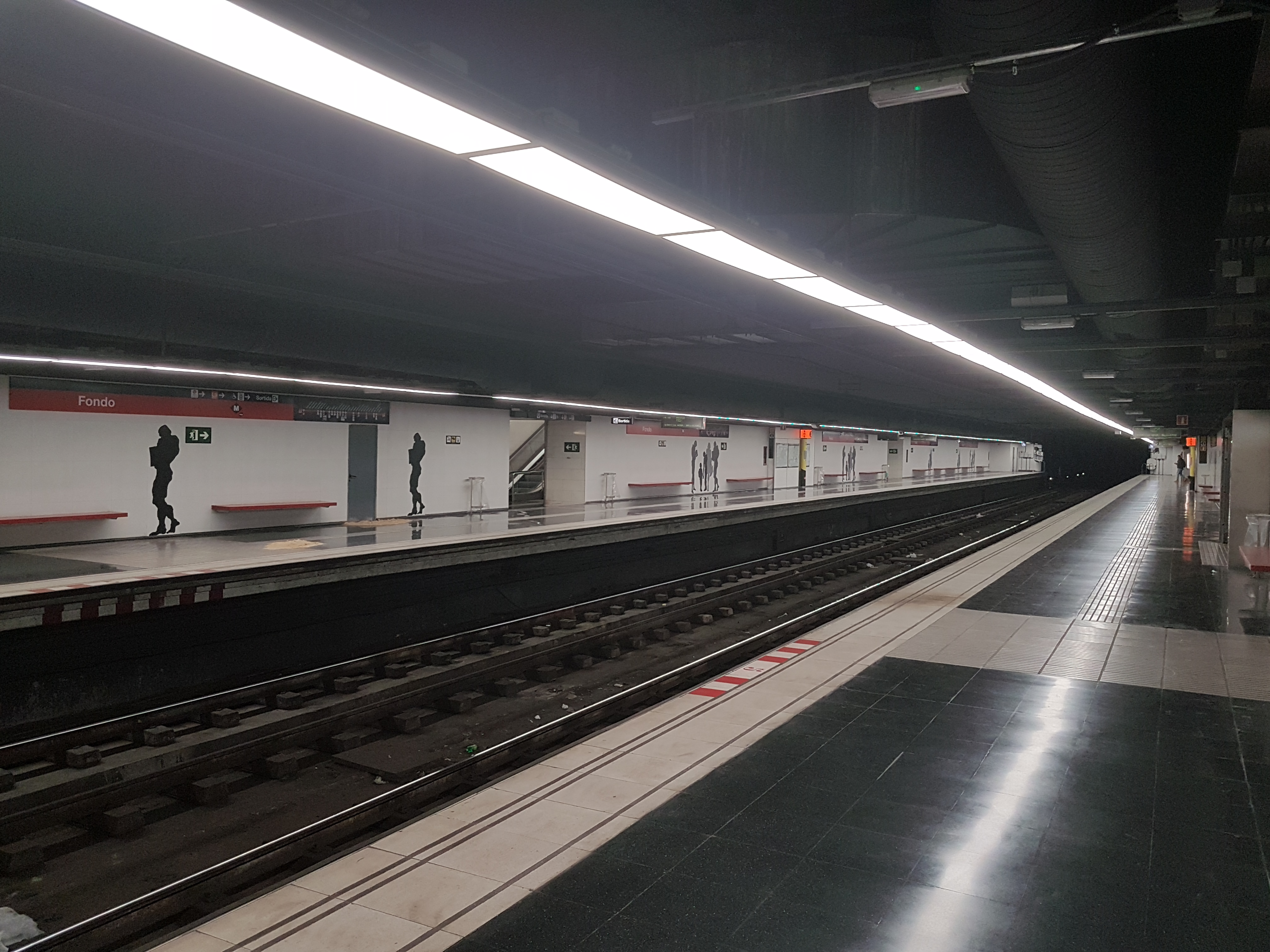 Estació de Fondo de la L1 del metro de Barcelona